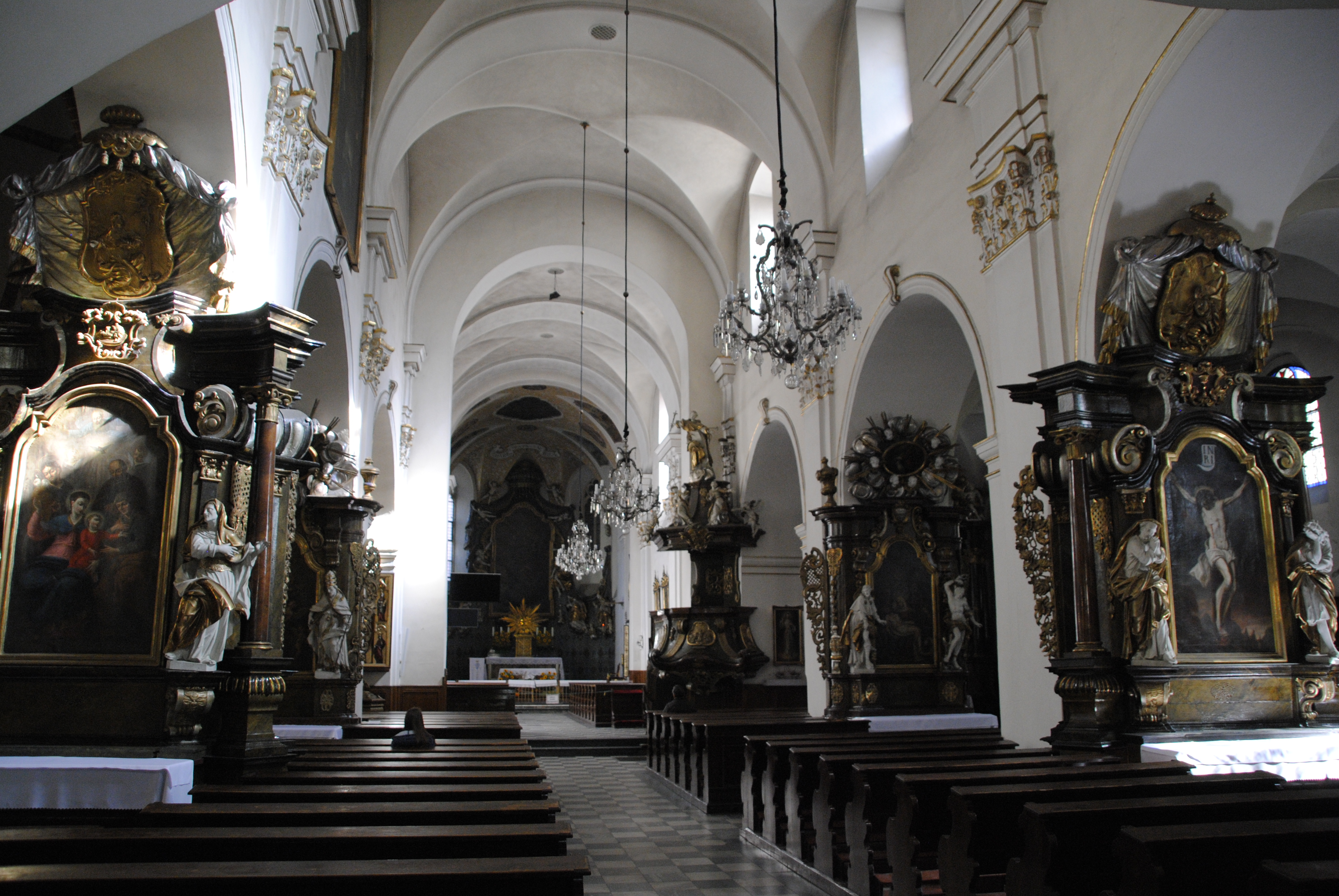 Innenraum der Kirche zur Schmerzhaften Muttergottes in Opole (Oppeln). Blick zum Altar